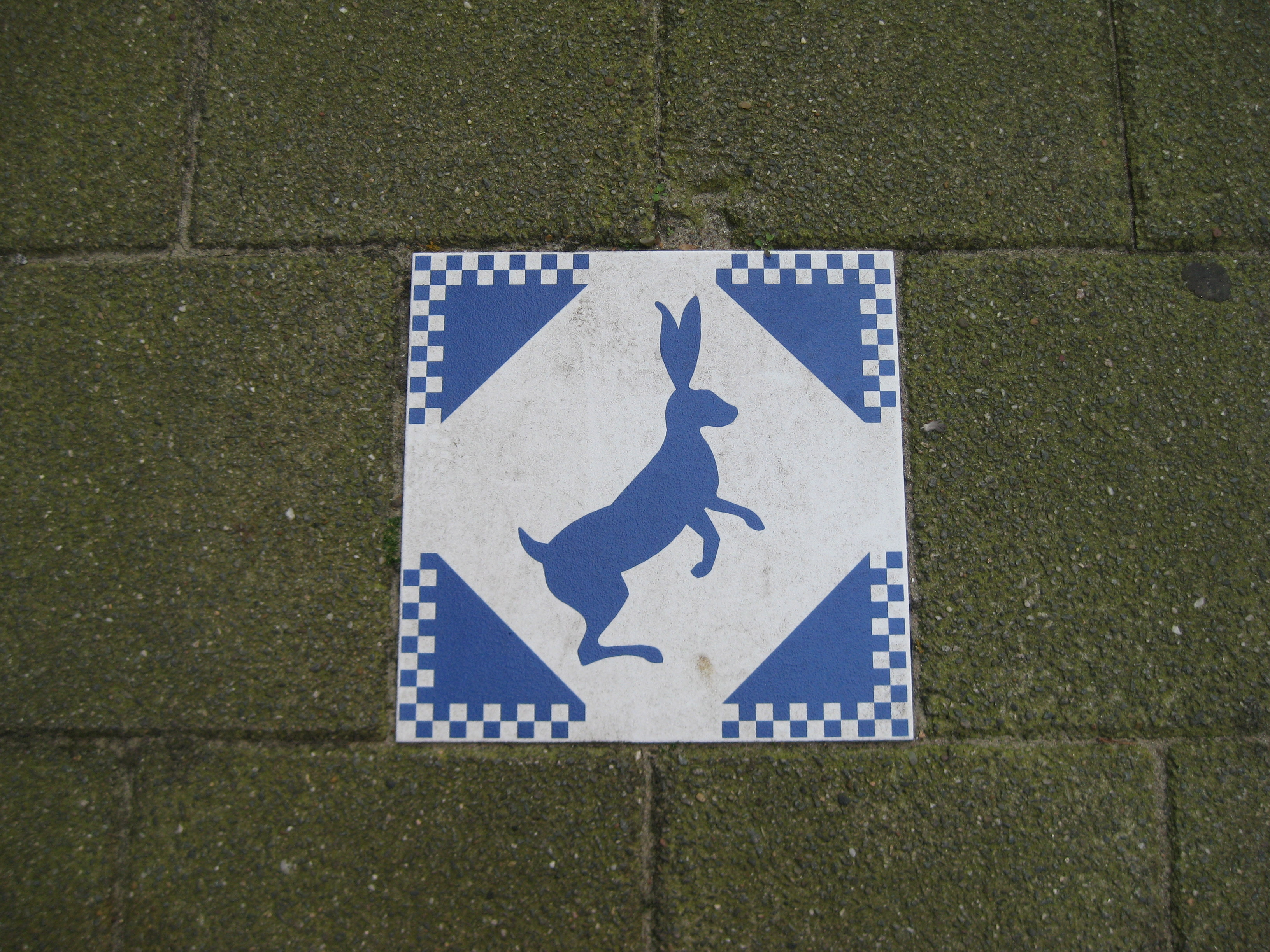 Haasje Over 2007 Gedecoreerde tegels in de Spaarndammerbuurt, Amsterdam. Kunstenaars Eline Janssens en Margot Berkman.